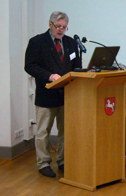 Grabungsleiter Klaus Gerken, der Ausgräber und Entdecker der Venus von Bierden beim Workshop „Neufund figuraler Kunst vom mesolithischen Fundplatz Bierden 31 im Kontext steinzeitlicher Frauendarstellungen“ im Niedersächsischen Landesmuseum beim Vortrag zur Ausgrabung mit der Entdeckung der Venus von Bierden